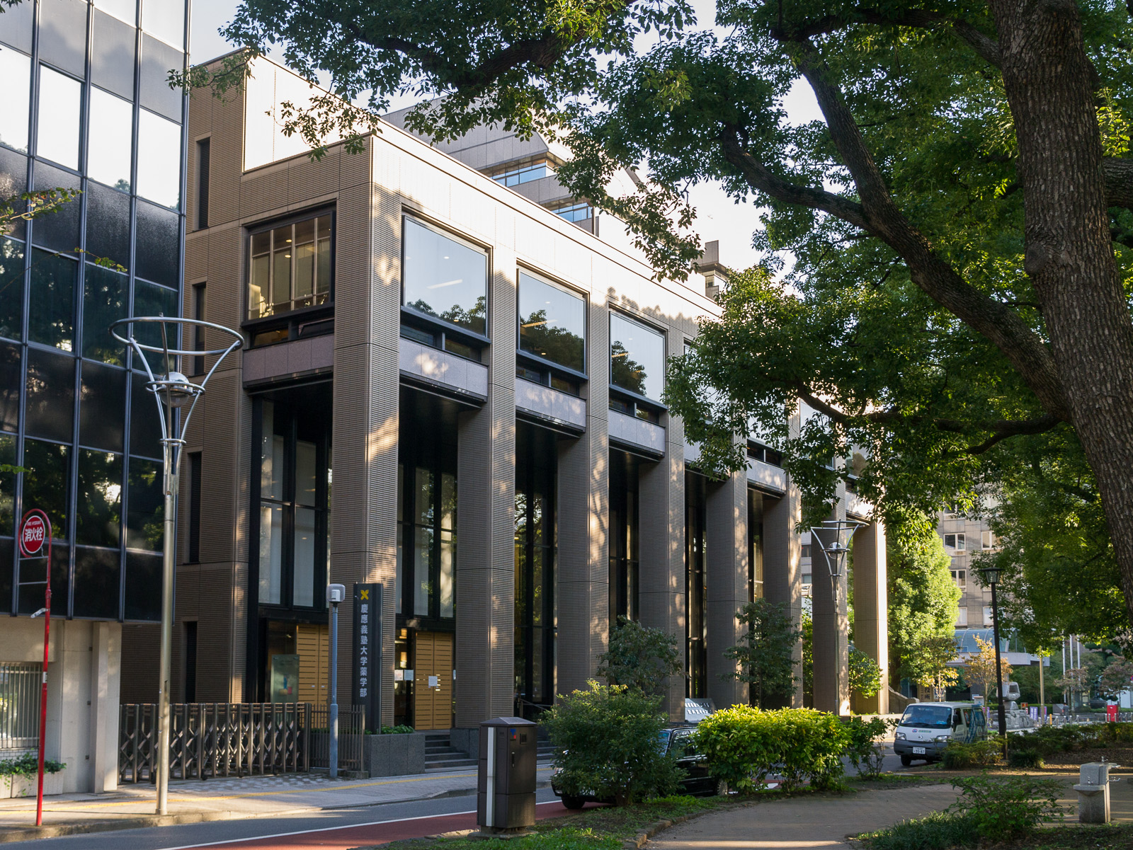 慶応義塾大学芝共立キャンパス（薬学部）1号館、東京都港区芝公園。